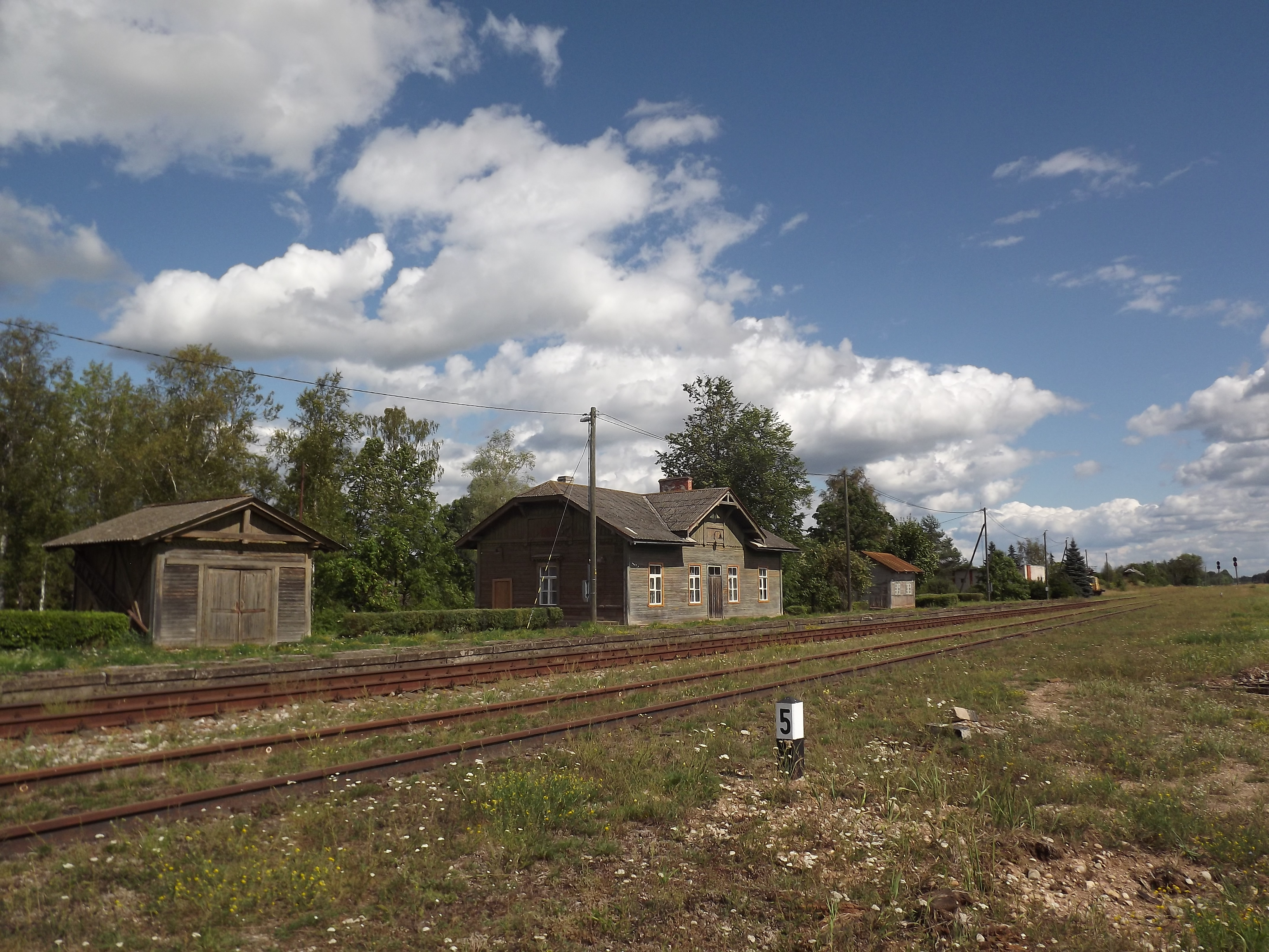 Lepassaare raudteejaam aastal 2014.